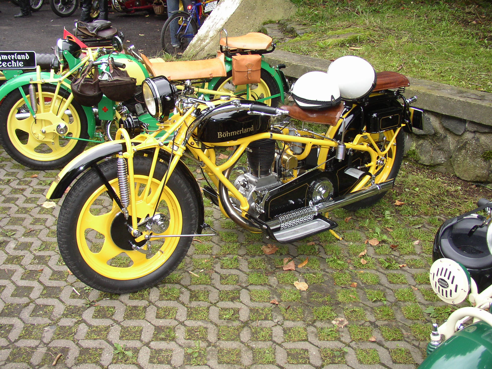 Motocykly Böhmerland, sraz Jiřetín pod Jedlovou, Czech republic